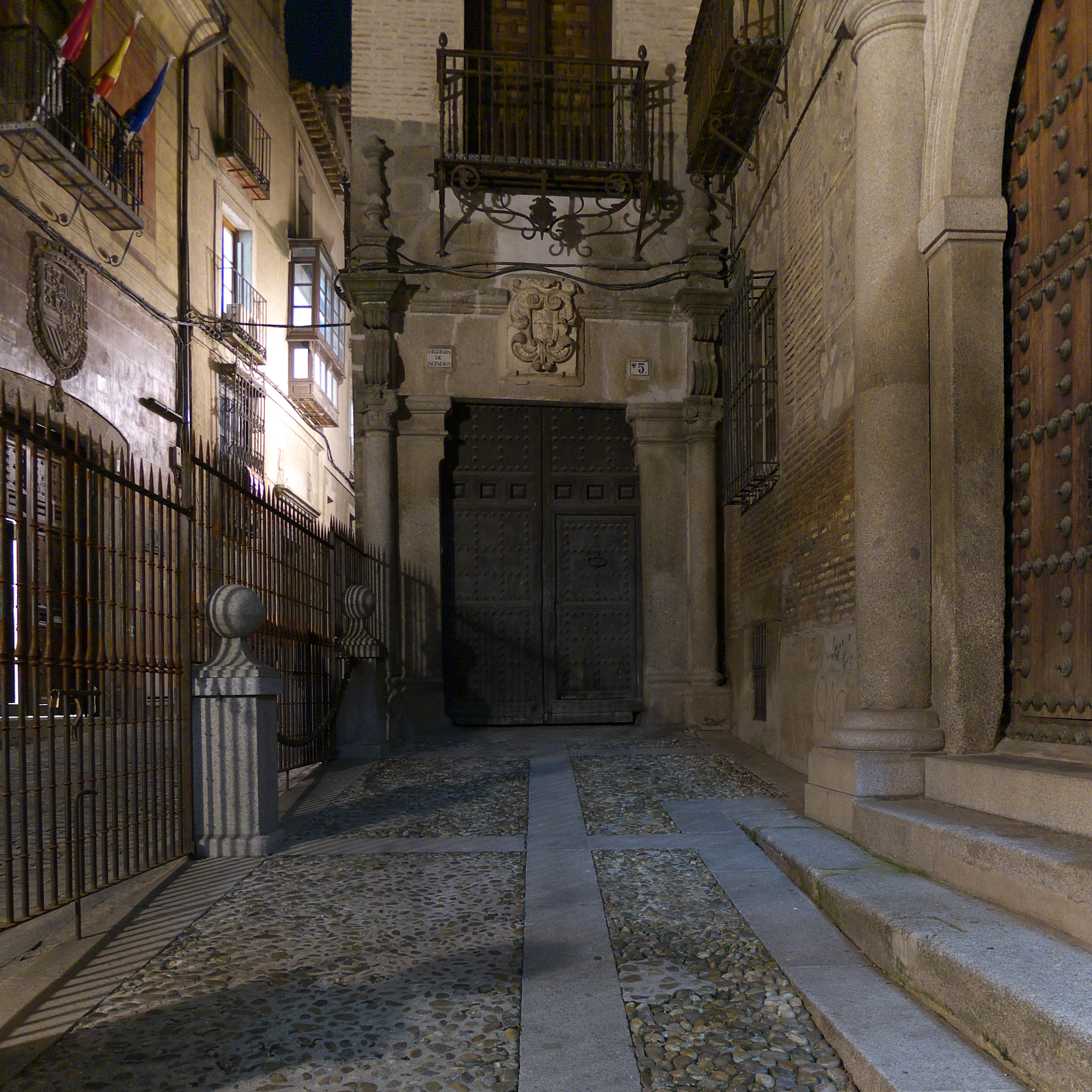 Casas-Palcios nobiliarias en Toledo